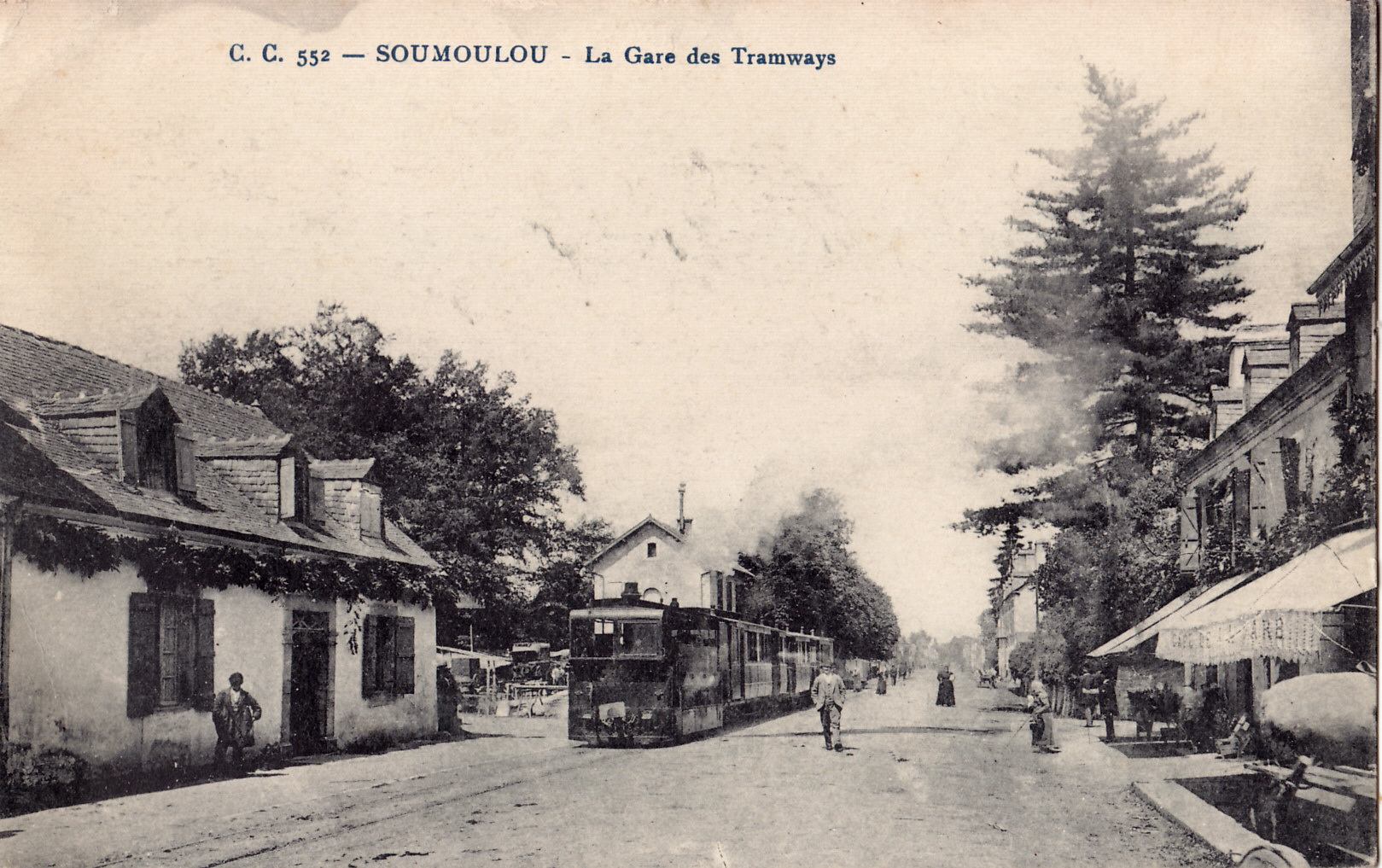 Carte postale ancienne éditée par